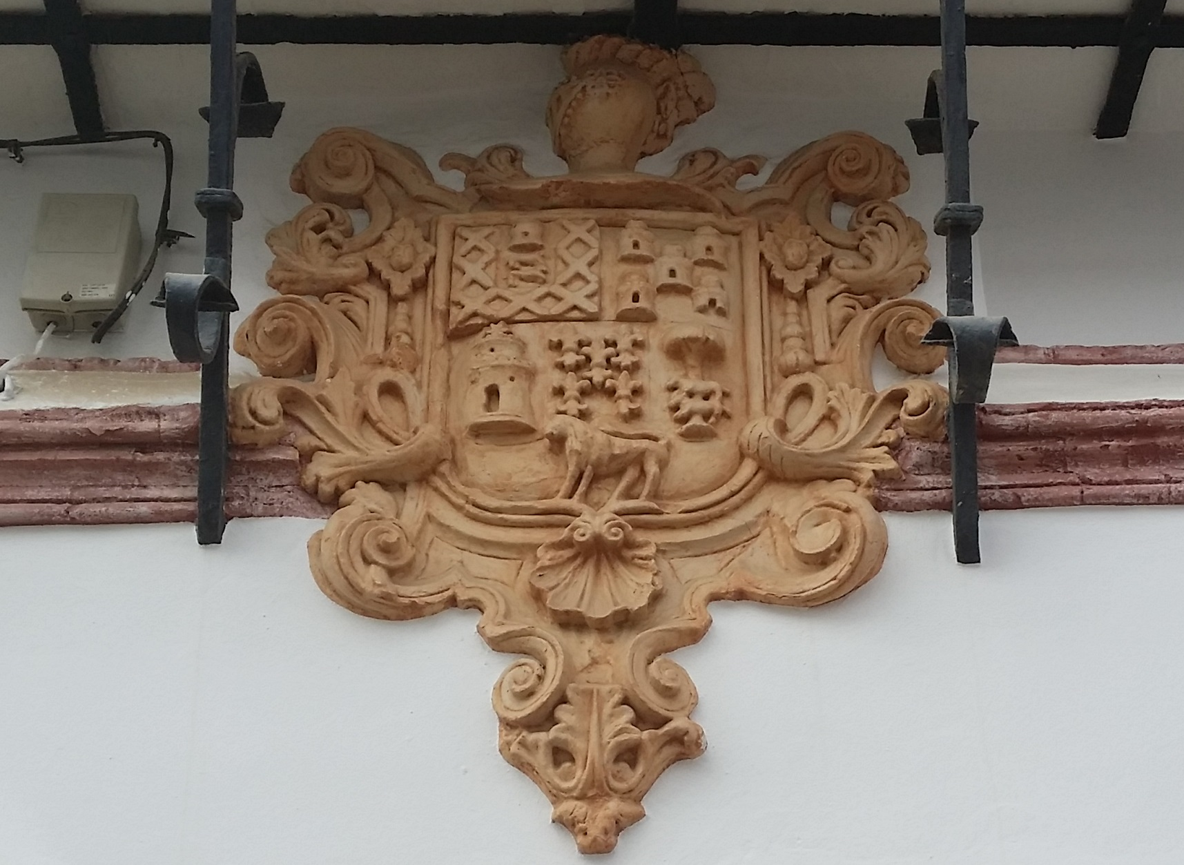 Escudo de Ruiz de Estrada en fachada de la casa-palacio de la familia del navegante y descubridor del Perú, Bartolomé Ruiz de Estrada.